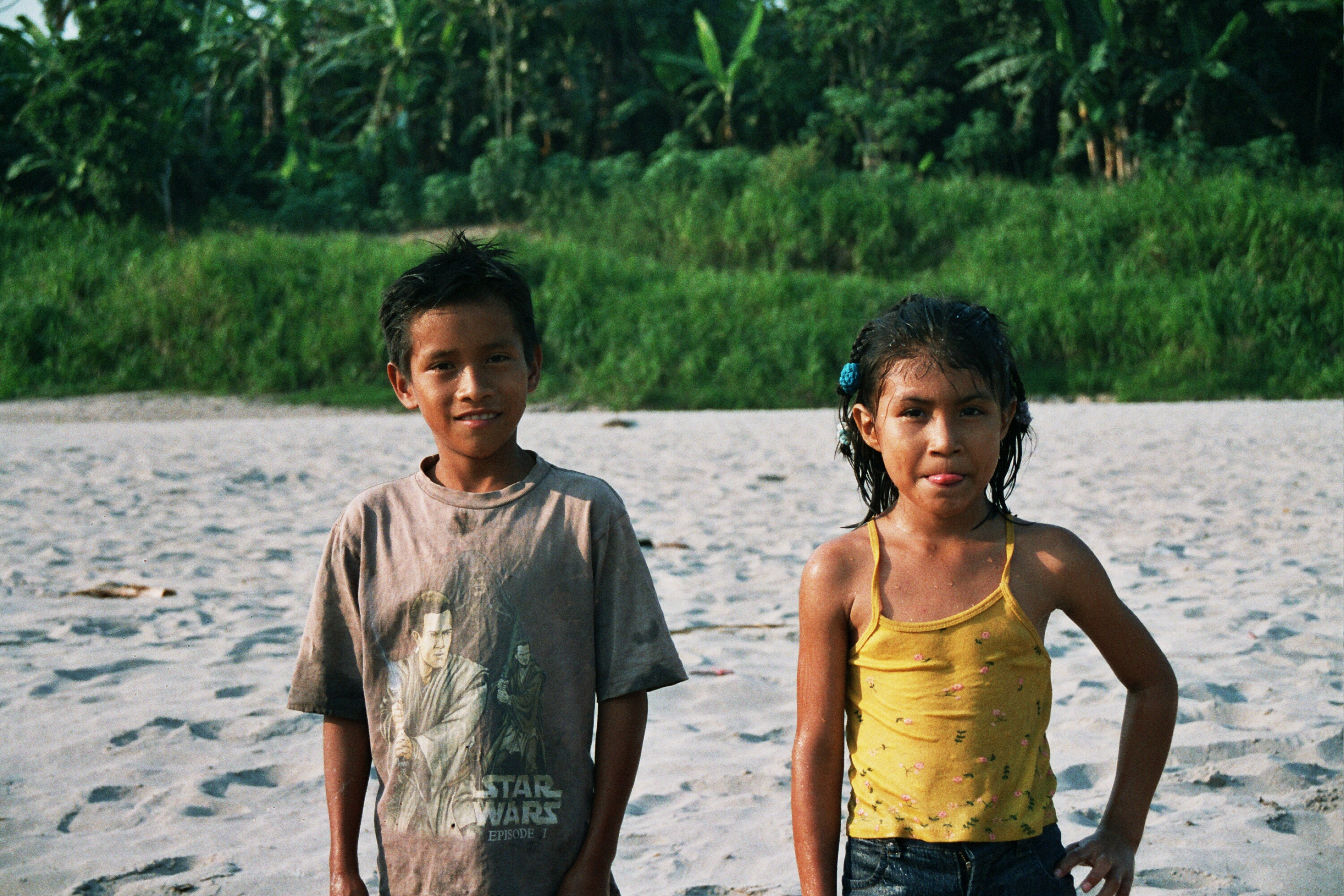 Kinder in Yurimaguas (Peru) am Amazonaszufluß Huallaga